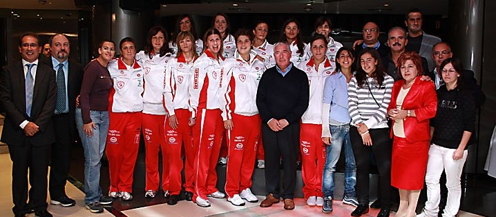 Centro Pallacanestro Rende (Calabra Maceri Rende, 2008-2009)